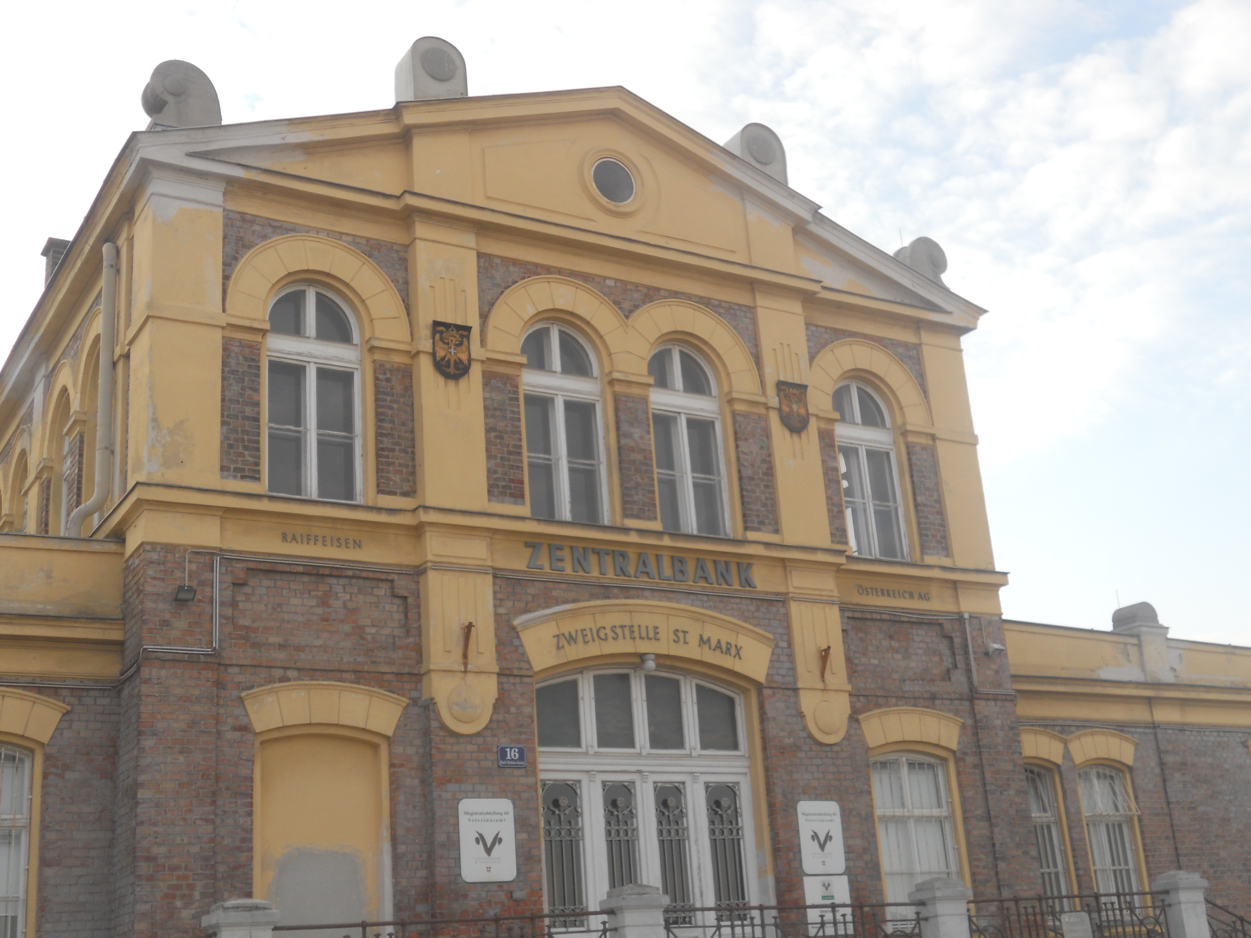 Das ehemalige Bankgebäude am Schlachthof Sankt Marx